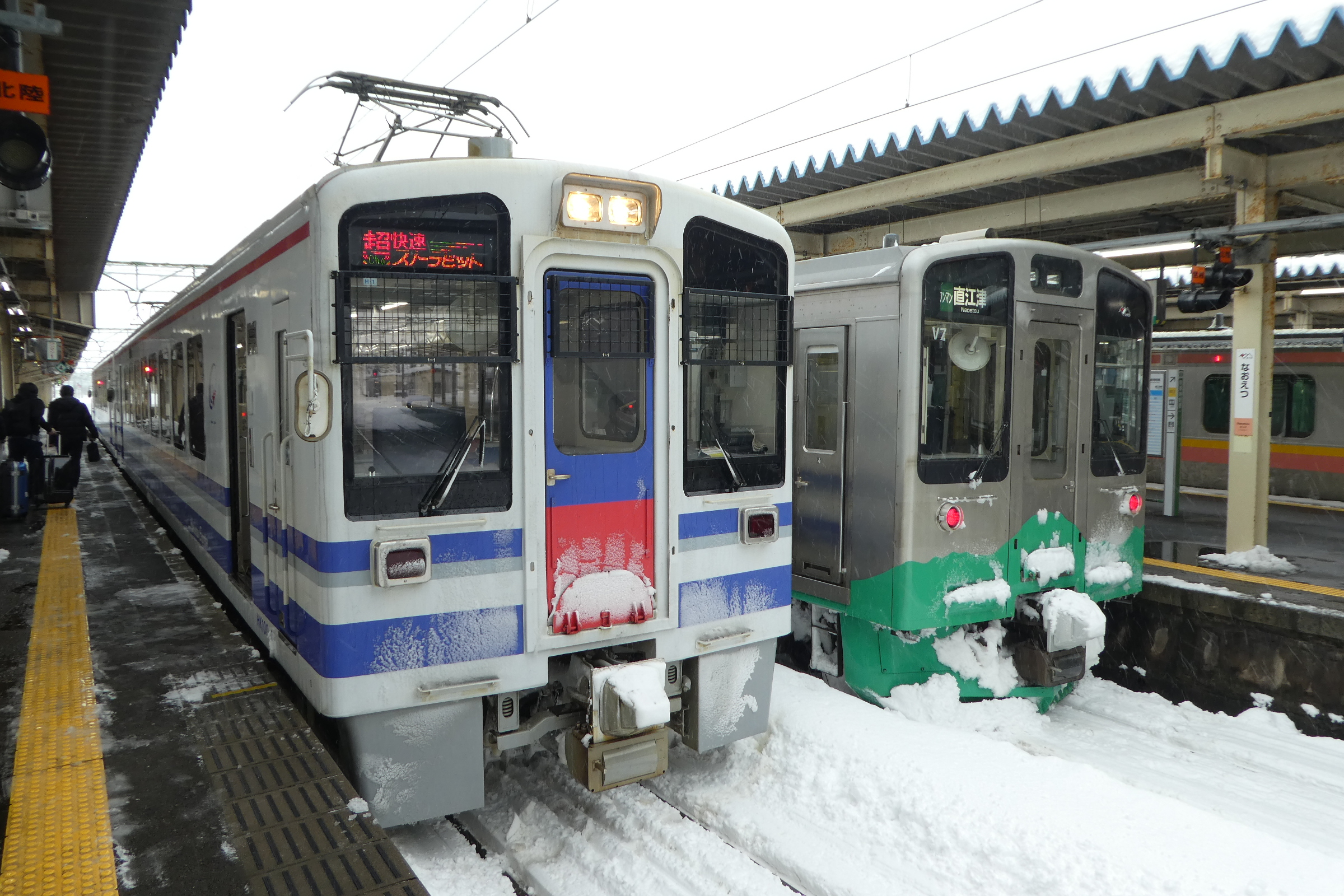 HK100形（HK100-1）の「超快速スノーラビット」。右はえちごトキめき鉄道妙高はねうまラインのET127系（V7編成）